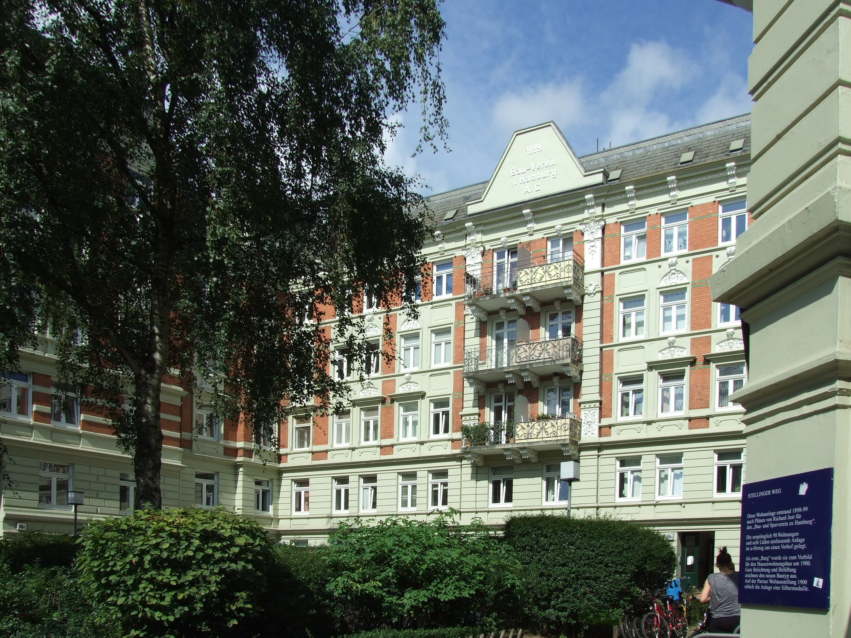 Stellinger Weg - Hamburger Burg 1898-1899